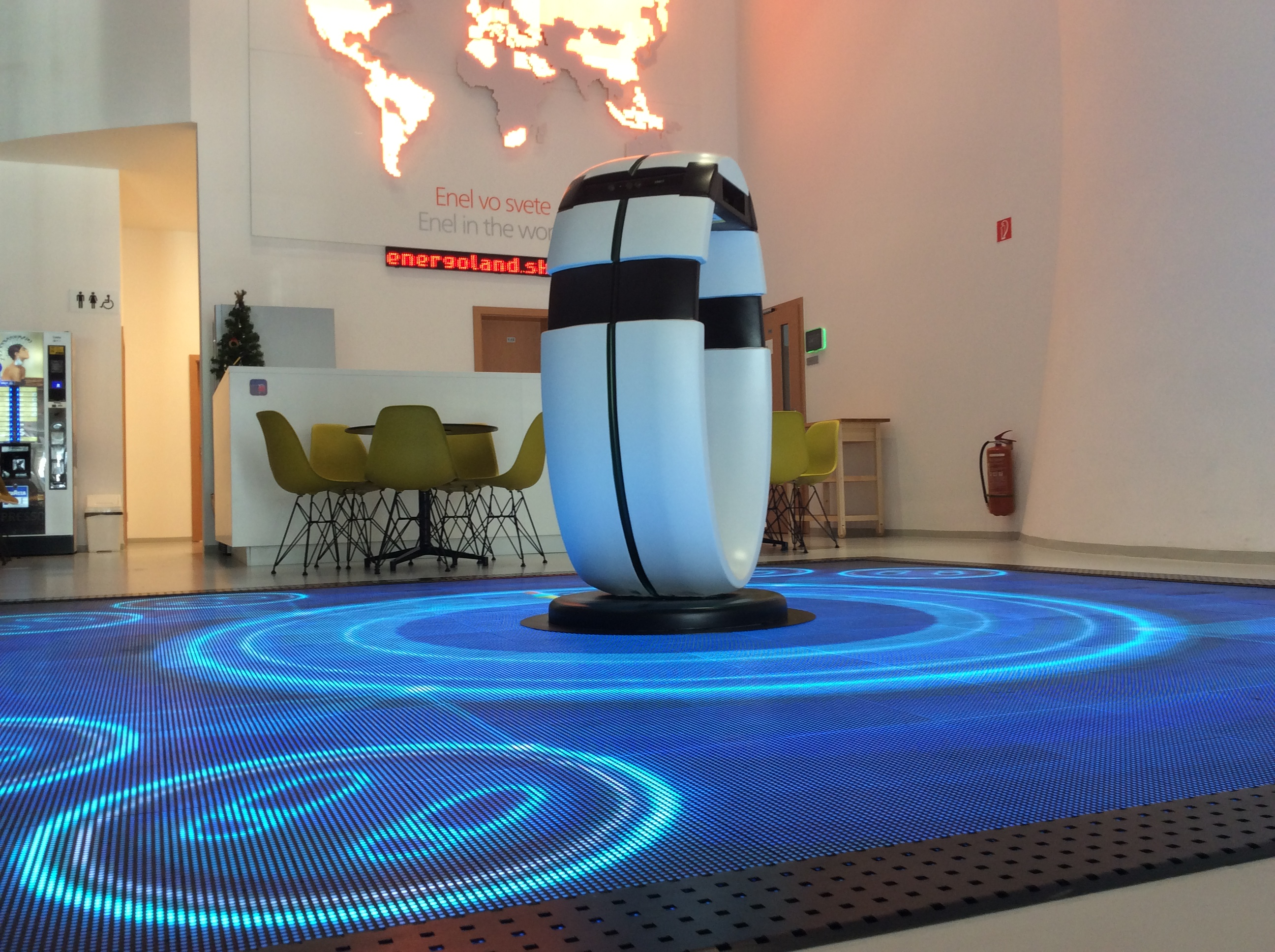 Interaktívna LED podlaha.